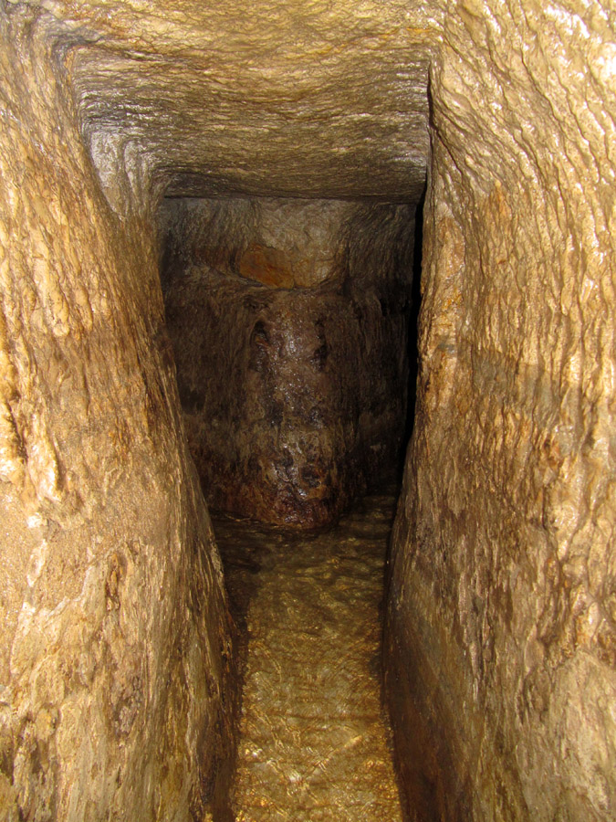 Hezekiah's Tunnel נקבת השילוח